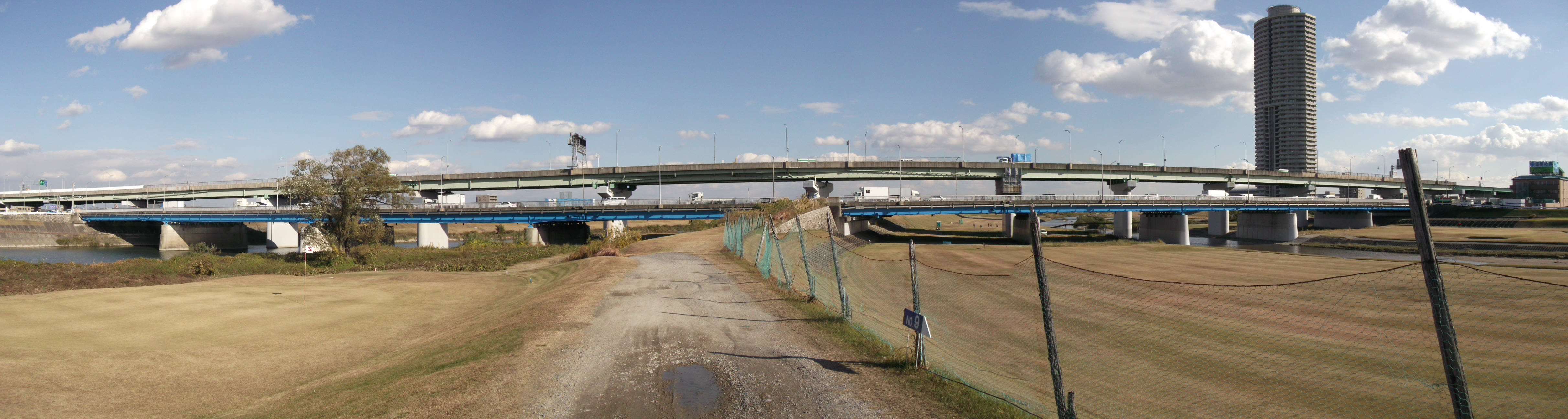 名古屋市北区の庄内川・矢田川に架かる国道41号・名古屋高速1号楠線の新川中橋を下流側（西側）から写す。